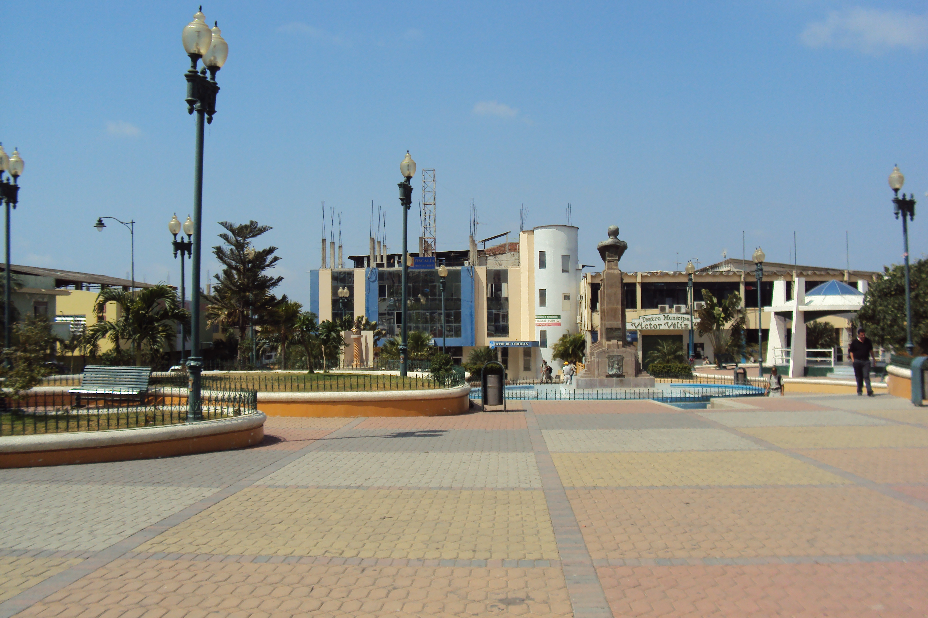 MONTECRISTY MANABÍ ECUADOR (PARQUE CENTRAL)